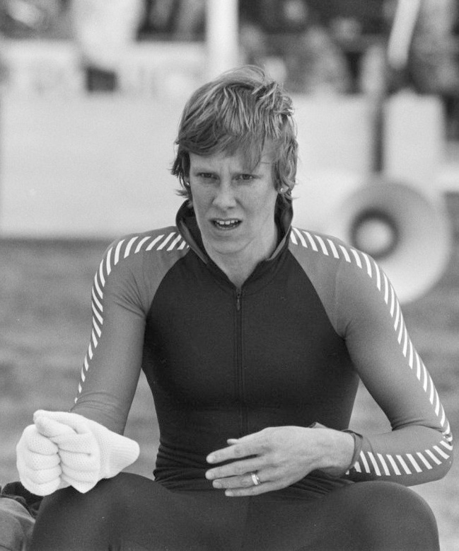 WK Sprint schaatsen in Alkmaar. Alie Boorsma zittend aan de kant